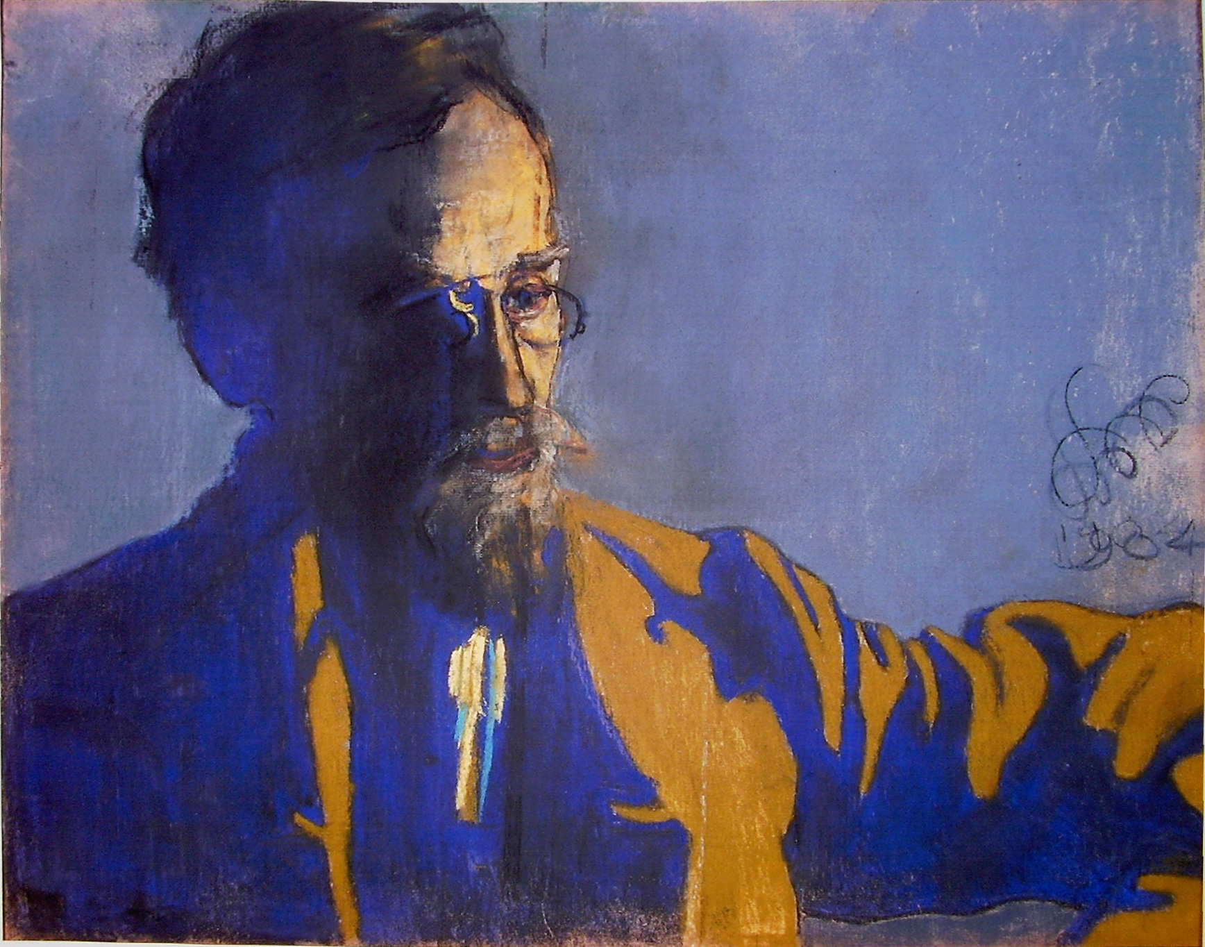 Portrait of Adam Chmiel by Stanisław Wyspiański 1904, Kraków, Poland